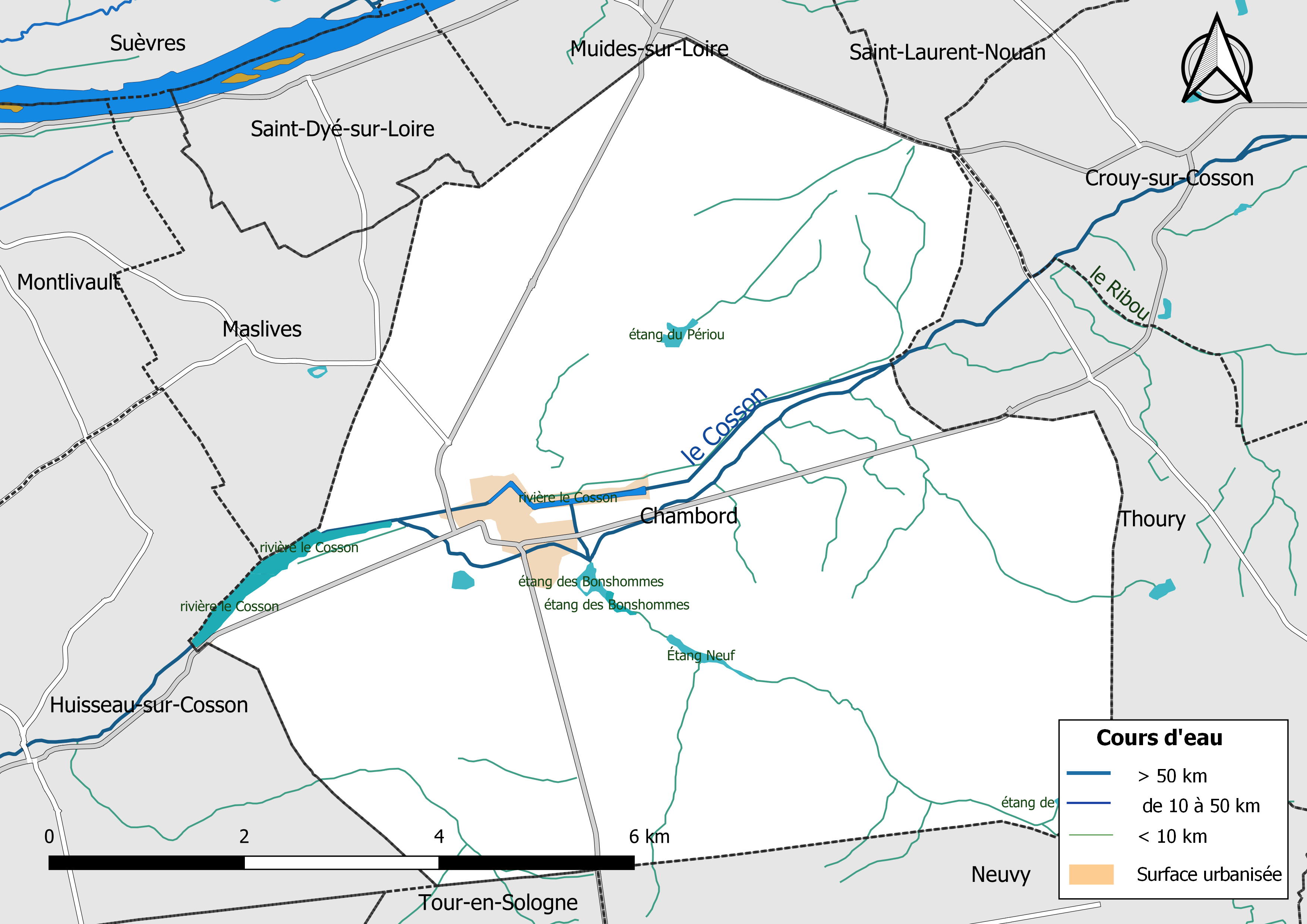 Carte du réseau hydrographique de la commune de Chambord (Loir-et-Cher, France).